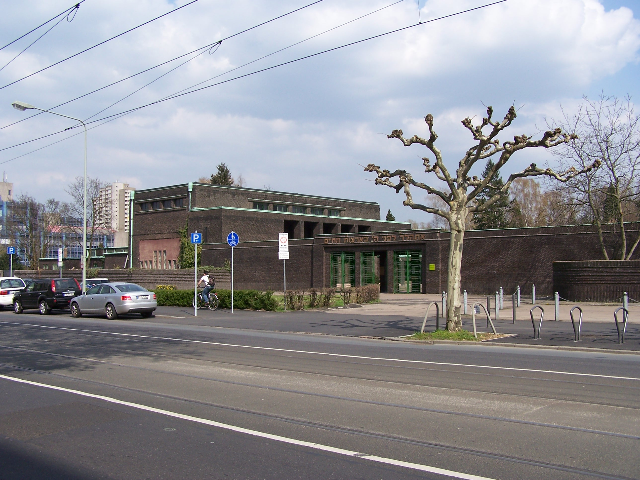 Portal des Neuen Jüdischen Friedhofs Frankfurt an der Eckenheimer Landstraße